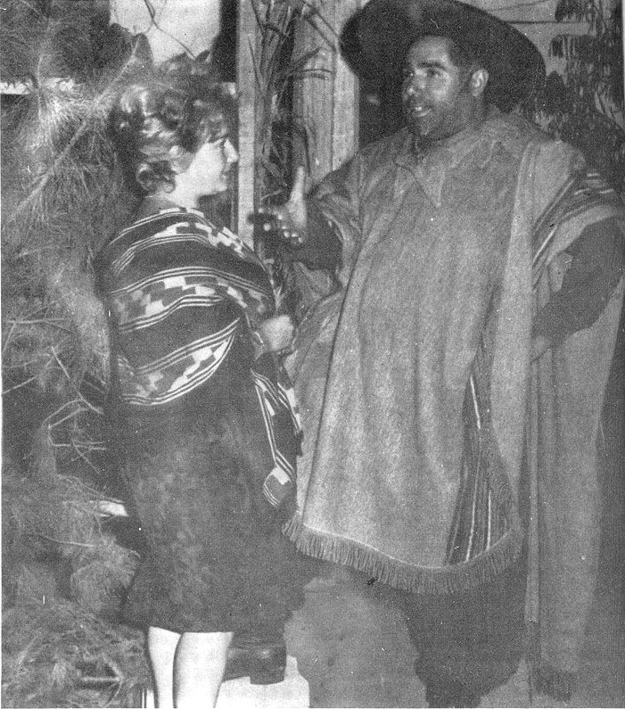 Fotografía del payador uruguayo Juan Carlos Bares "el indio" junto a su esposa Marta, aparecida en la revista argentina "Rincón del Payador" nº4, en setiembre de 1980.